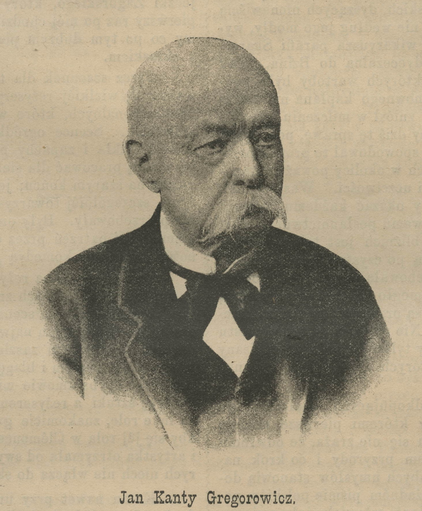 Jan Kanty Gregorowicz (pseudonim Janek z Bielca) - dziennikarz i pisarz, szczególnie zainteresowany tematyką wiejską